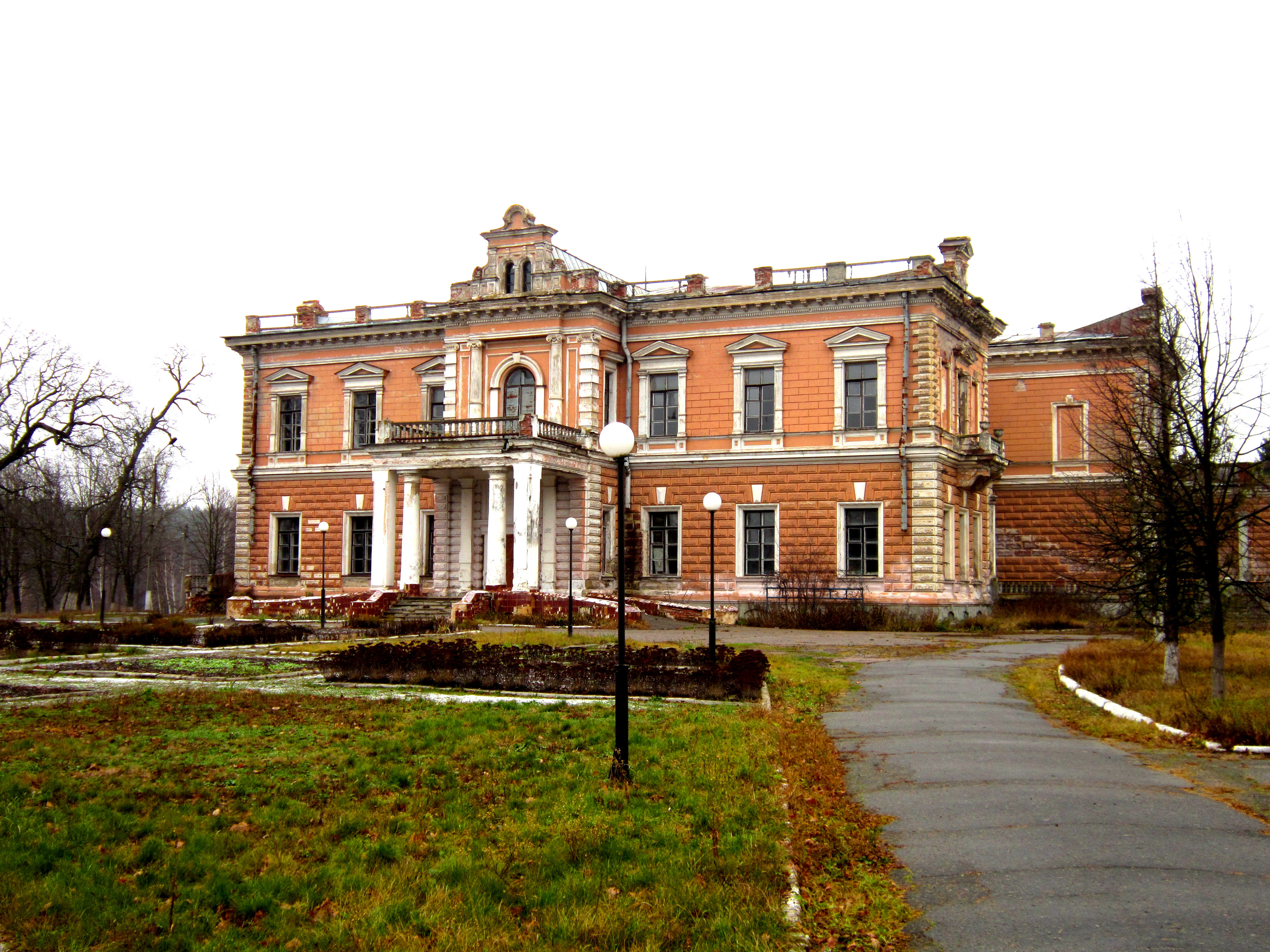 «Кияницький»